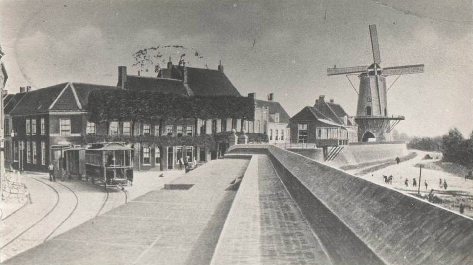 Prentbriefkaart met zich op onder meer het eindpunt van de stoomtram Wijk bij Duurstede - Doorn en de Dijkstraat. Vervaardiger onbekend. Gelet op artikel 38 van de Auteurswet 1912 en de nadere invulling daarvan zoals verduidelijkt onder punt 1.1.5.12 van de Juridische wegwijzer archieven en musea online en de discussie hier is het auteursrecht op deze afbeelding in elk geval vervallen vanaf 1 januari 2000.